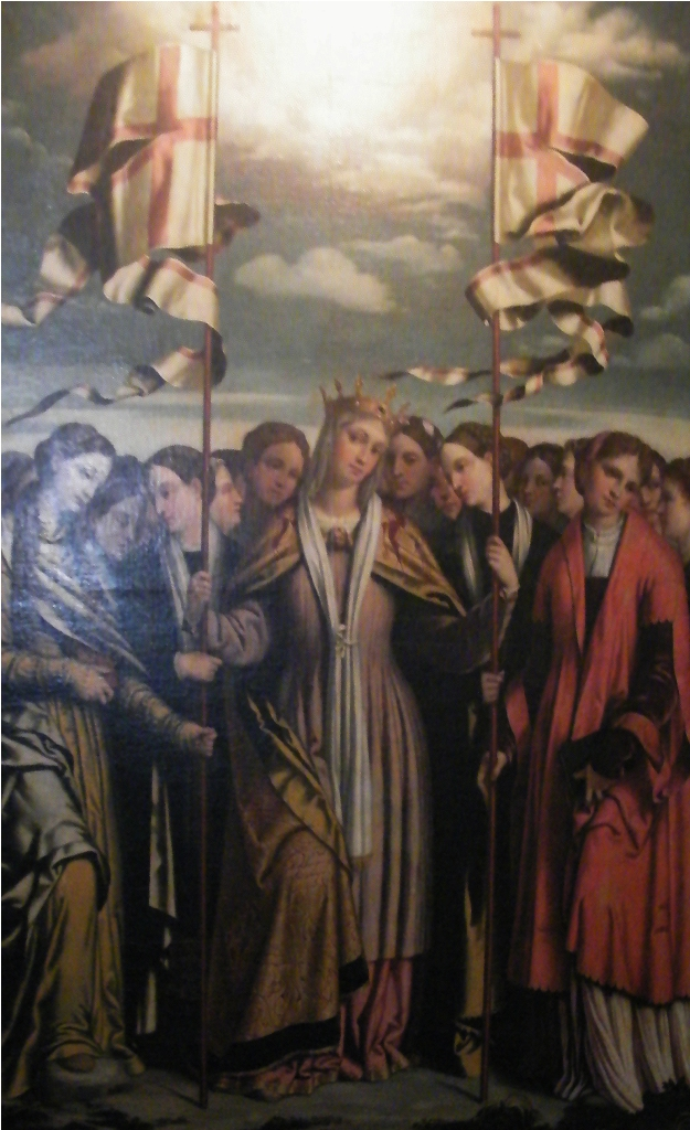 Sant'Orsola e compagne martiri (Moretto) - Chiesa di S. Clemente - Brescia